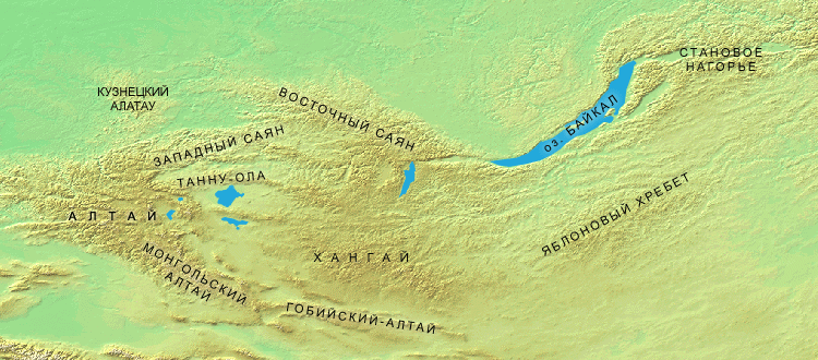 Физическая карта (Алтай, Саяны, Байкал, Монгольский Алтай)